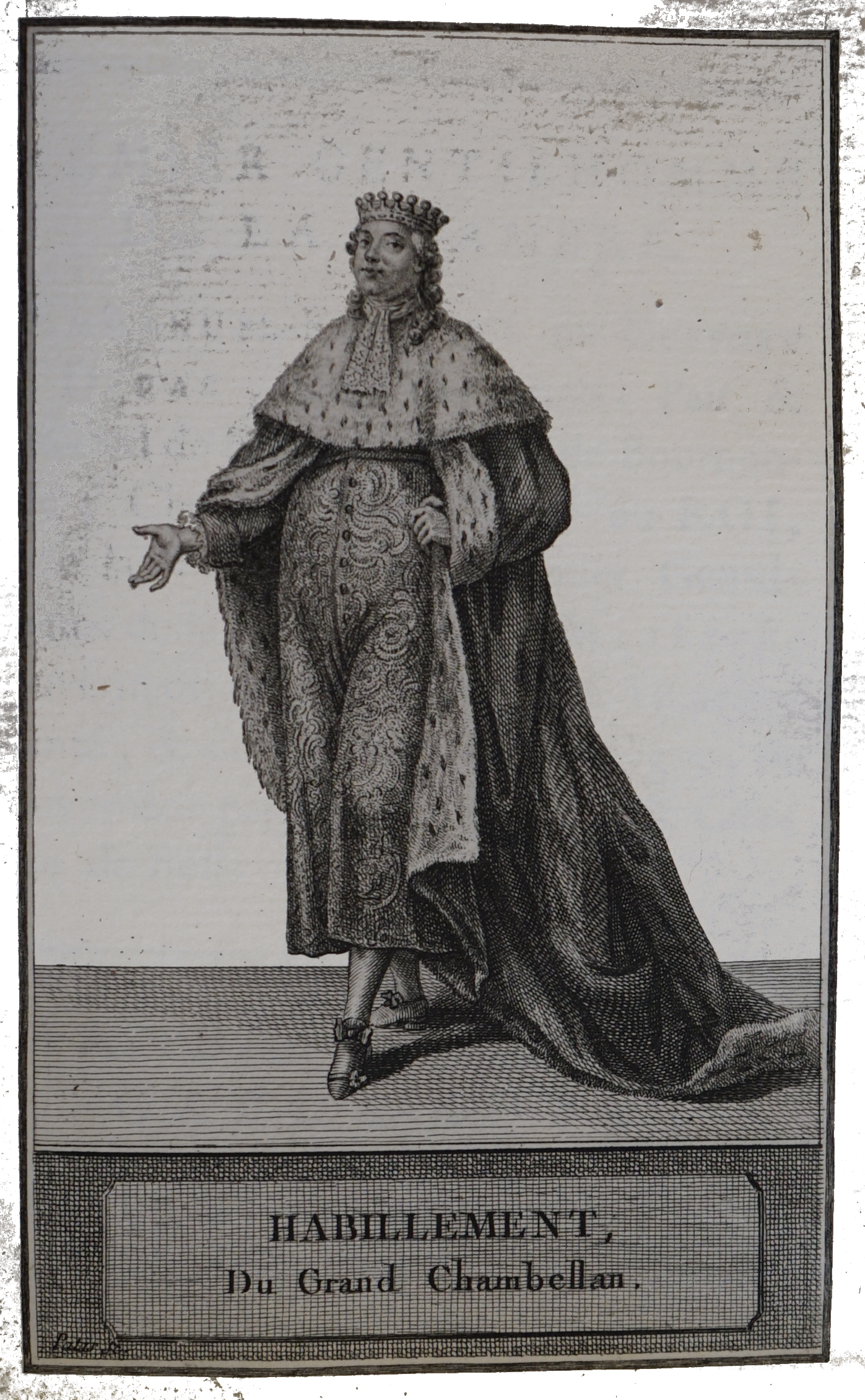 extrait du livre "Sacre et couronnement de Louis XVI ...".